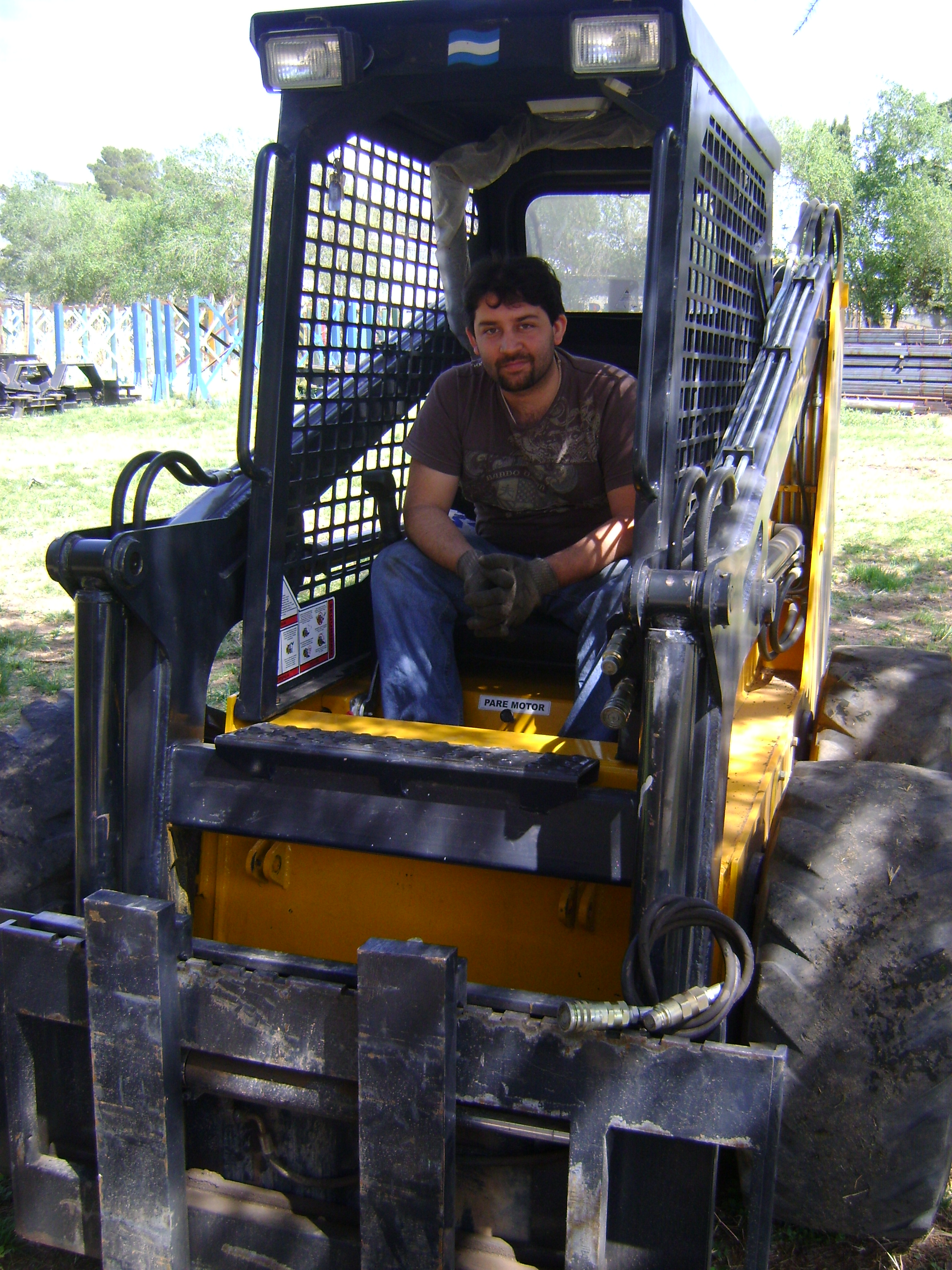 monocavadora fabricada en MATERIAL FERROVIARIO (MATERFER).